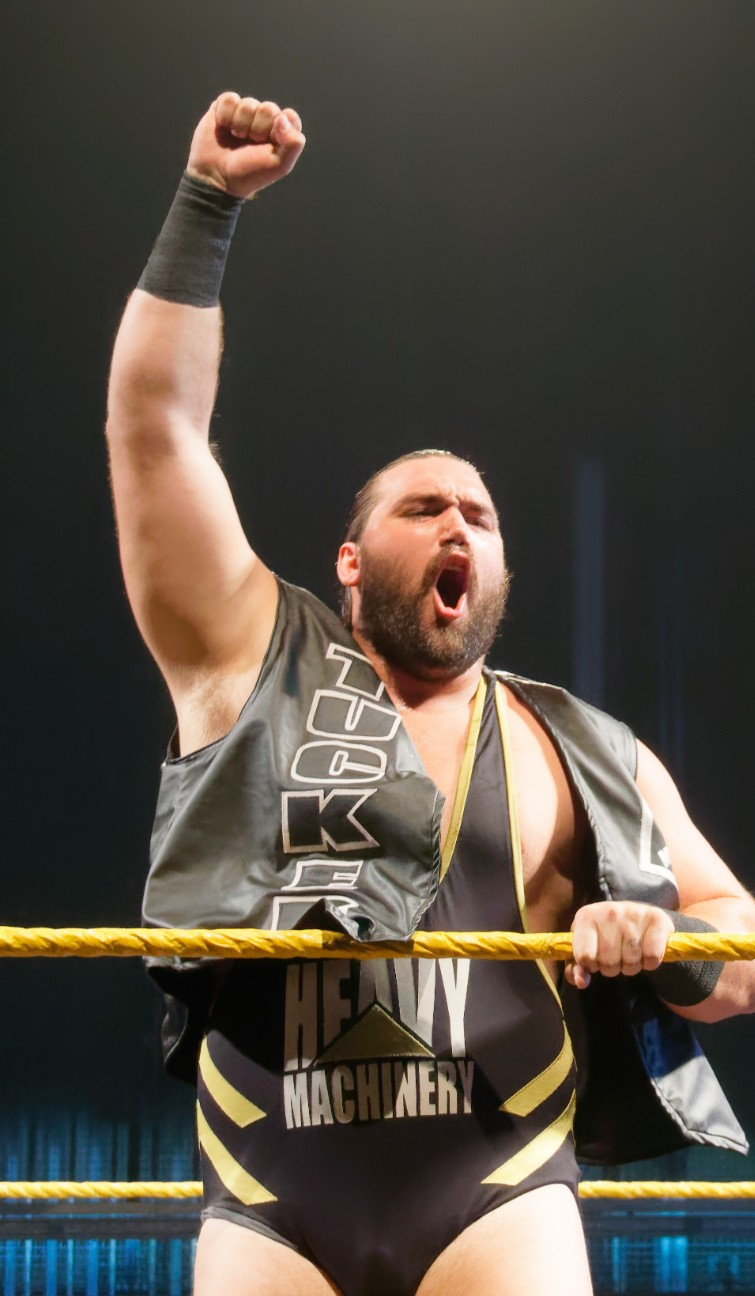 WWE Live 2018 - Antwerpen (NxT) - Otis Dozovic&Tucker Knight Vs Fabian Aichner&Marcel BarthelOtis Dozovic&Tucker Knight def. (Pin) Fabian Aichner&Marcel Barthel( Bonne nouvelle pour les inconditionnels du catch en Belgique : le mardi 12 juin 2018, les superstars de NXT donneront le meilleur d'eux-memes au Stadsschouwburg Antwerpen, lors d'un show exclusif au Benelux.WWE NXT est une emission televisee creee en 2010, durant laquelle de jeunes catcheurs sont formes par des veterans comme Chris Jericho et C.M. Punk. Tous partagent le meme reve : devenir la nouvelle star du catch. Le programme WWE NXT a tres vite rencontre un enorme succes. Aujourd'hui, WWE NXT est connu comme une veritable machine a talents. Pensez par exemple a Seth Rollins, qui etait encore chez nous pas plus tard que l'annee derniere pour WWE Live.Cette annee encore, vous aurez la chance de voir a l'oeuvre de nombreux nouveaux talents du catch ! A l'affiche, on trouve notamment Aleister Black, Adam Cole, Undisputed Era, Velveteen Dream, Ricochet, Nikki Cross, Shayna Baszler et Kairi Sane. Le line-up reste sujet a des changements de derniere minute.Attendez-vous a un show sensationnel et plein de tension ! )